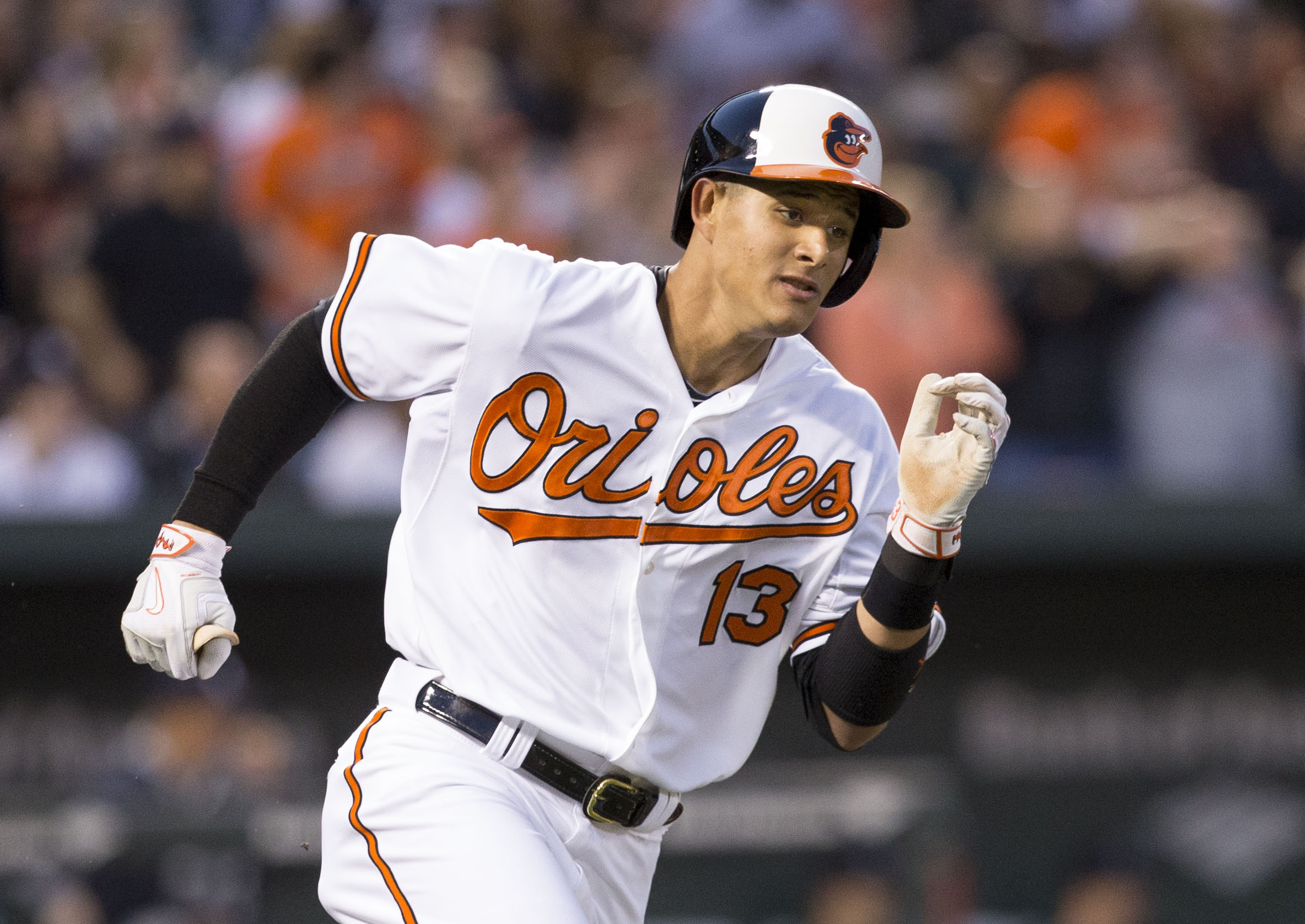 Yankees at Orioles 04/13/15